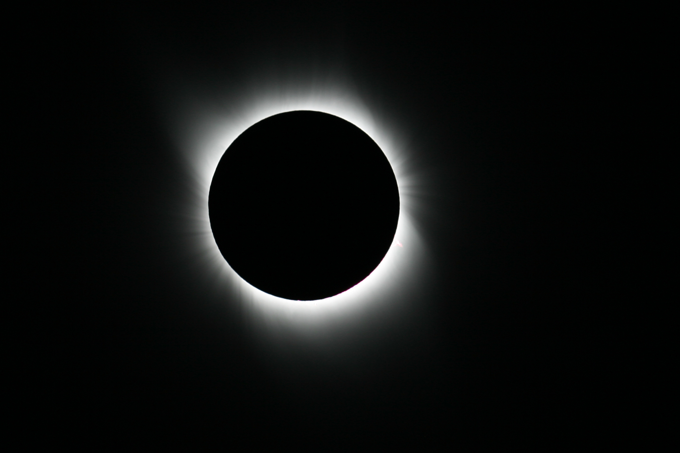 日冕，攝於2008年8月1日19:09:56 (日全食進行中)。地點：中國新疆維吾爾自治區哈密地區伊吾縣葦子峽